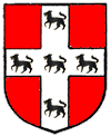 Armas de los Albiz, Parientes Mayores de Vizcaya: cruz blanca cargada de cinco lobos sobre campo de gules.